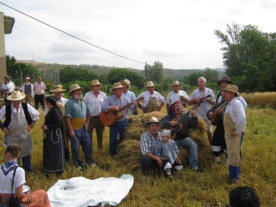 Foto del almuerzo de los segadores de Lituenigo, en el que entonan diversas jotas